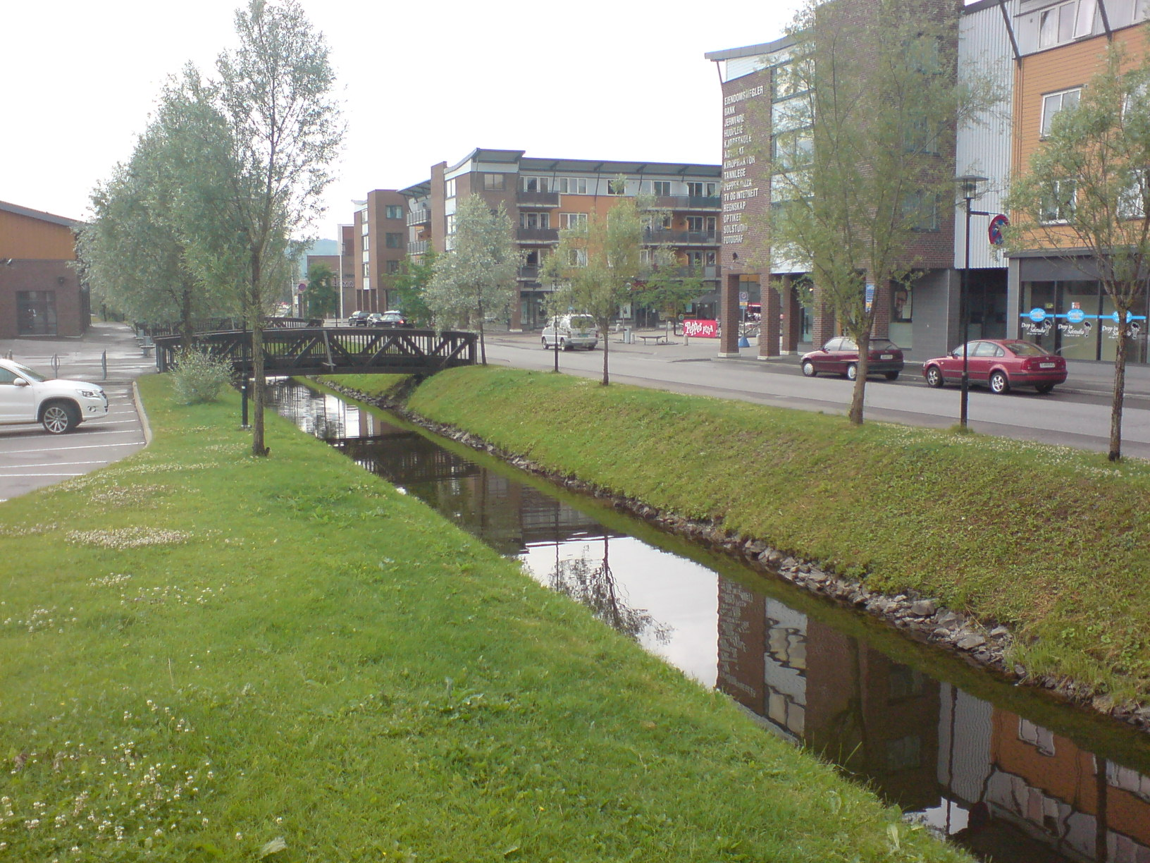 Nittedal sentrum i Akershus.